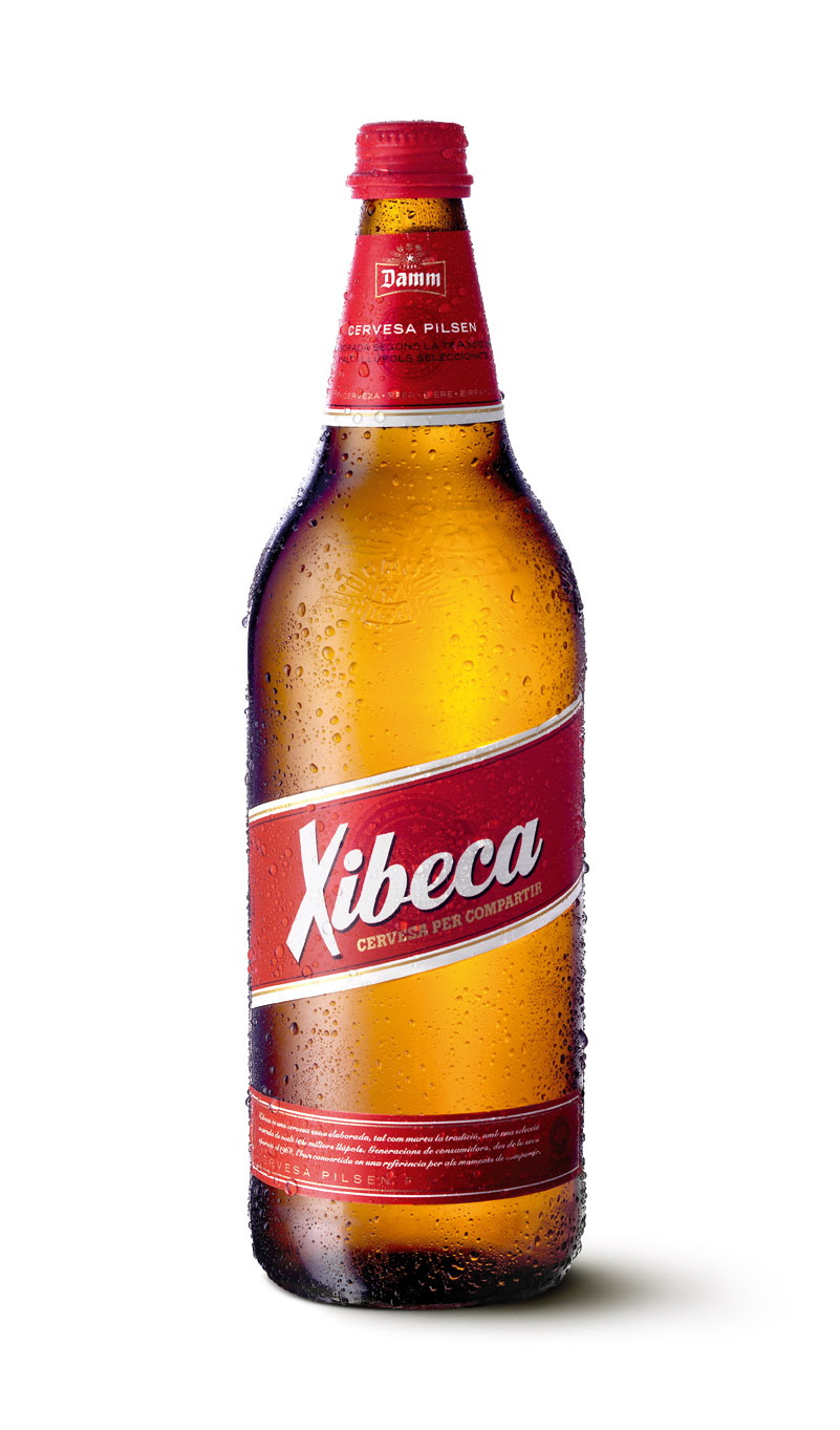 Cerveza Xibeca botella vidrio 1l